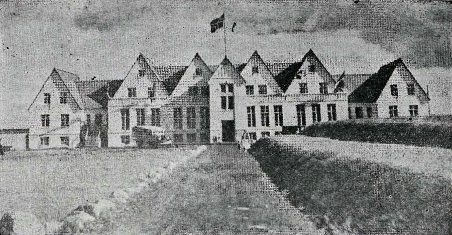 Héraðsskólinn á Laugarvatni á 30 ára afmæli sínu 1959. Skólinn var teiknaður af Guðjóni Samúelssyni.